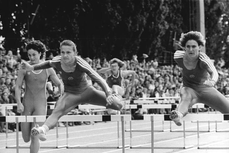 Gloria Siebert, Cornelia Oschkenat, Kerstin Knabe ADN-ZB Oberst 13.9.88 Berlin: Leichtathletik-Meeting zur Verabschiedung der Olympiastarter- Gloria Siebert (SC Cottbus- vorn links) gewann den ersten Lauf über 110 m Hürden in 12,47 s vor Cornelia Oschkenat (SC Dynamo Berlin, rechts). Kerstin Knabe (SC DHfK Leizig- links hinter Siebert) wurde Vierte.